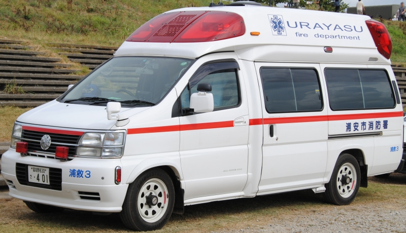 浦安市消防本部の救急車